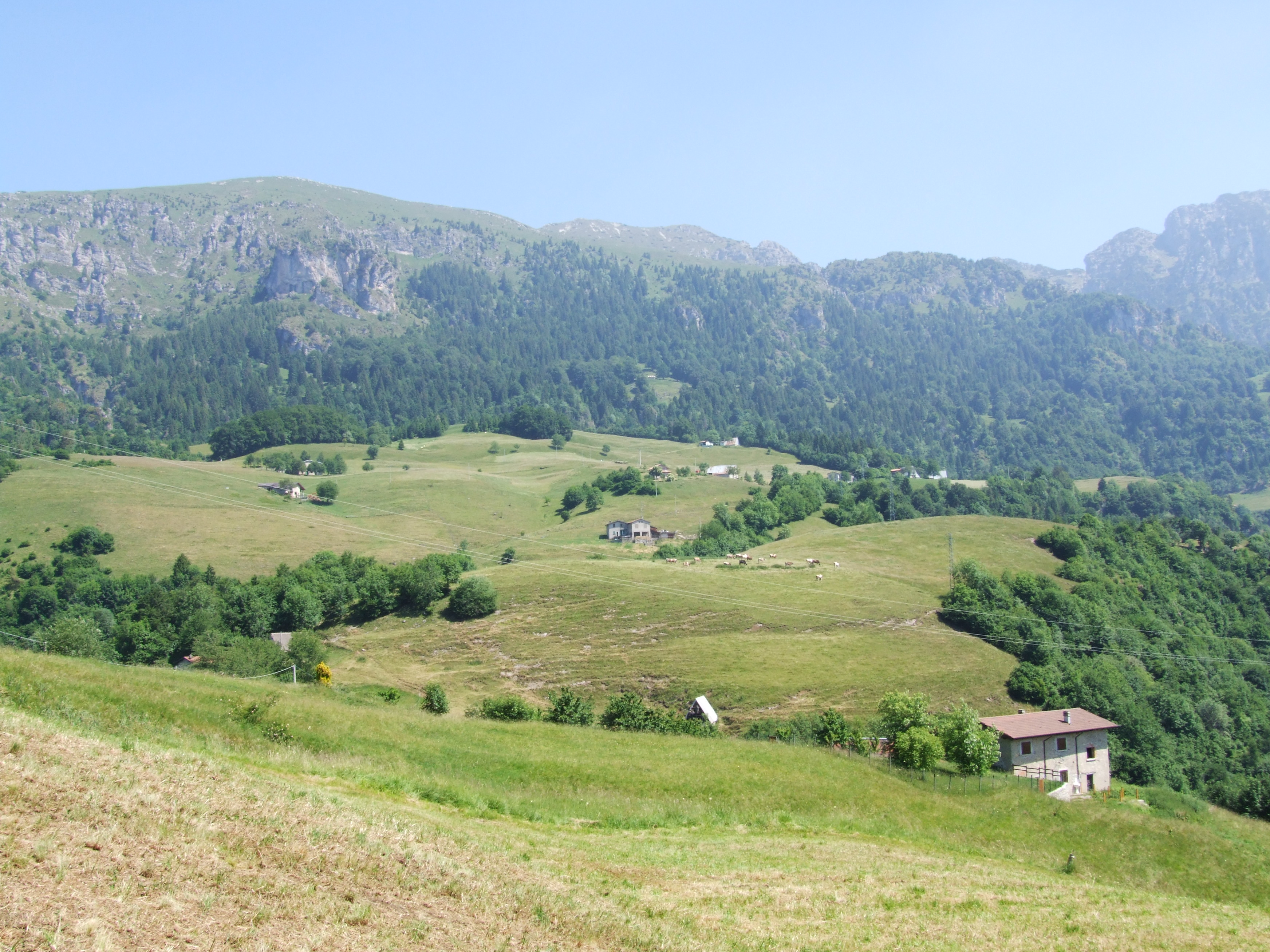 altopiano di Denai a Magasa in provincia di Brescia